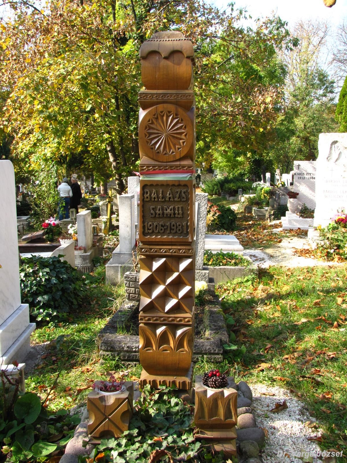 Balázs Samu sírja a budapesti Farkasréti temetőben. (Farkasréti temető: 25-6-67)